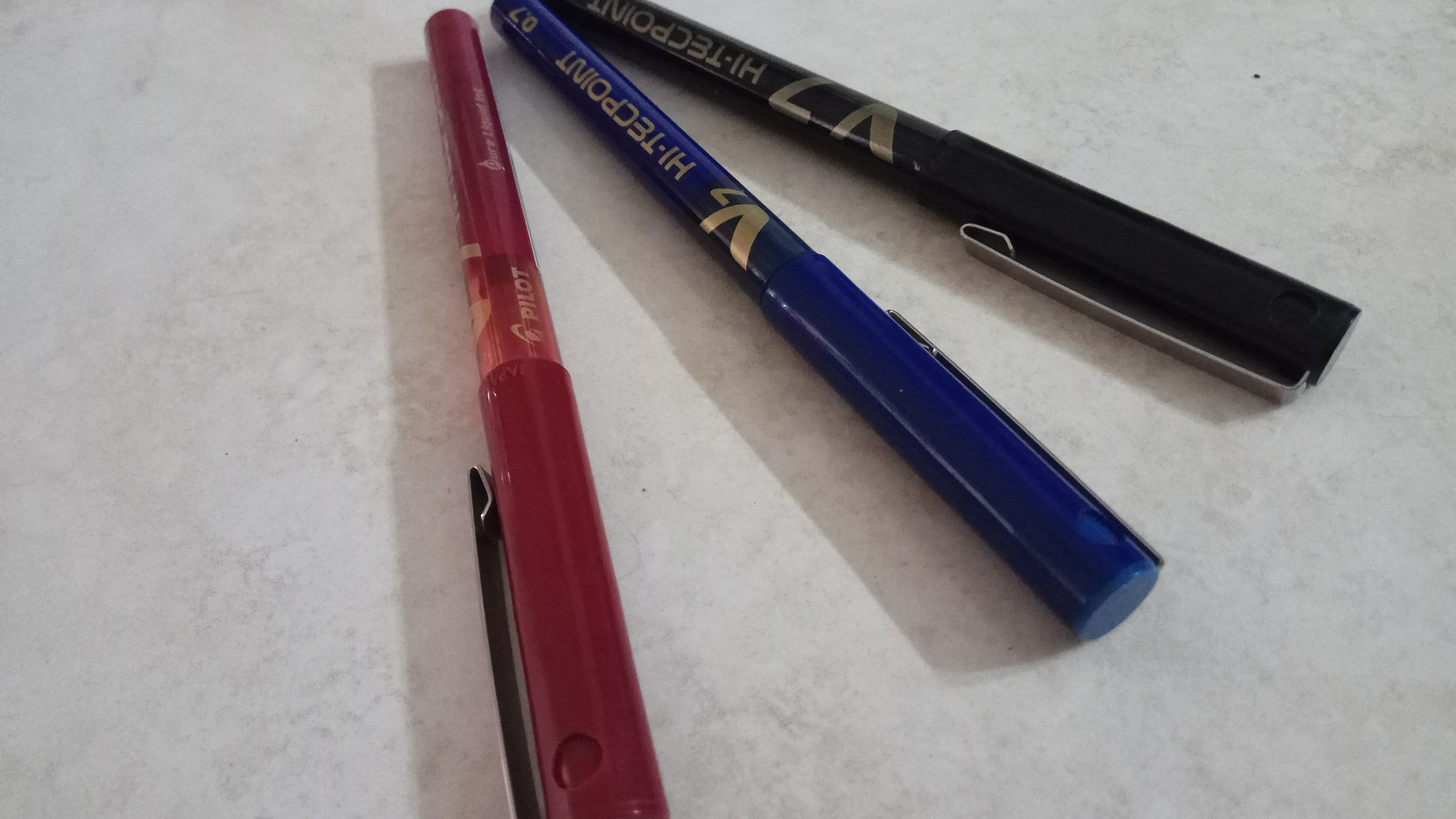 עטים בשלושה צבעים כחול,אדום ושחור של חברת פיילוט .